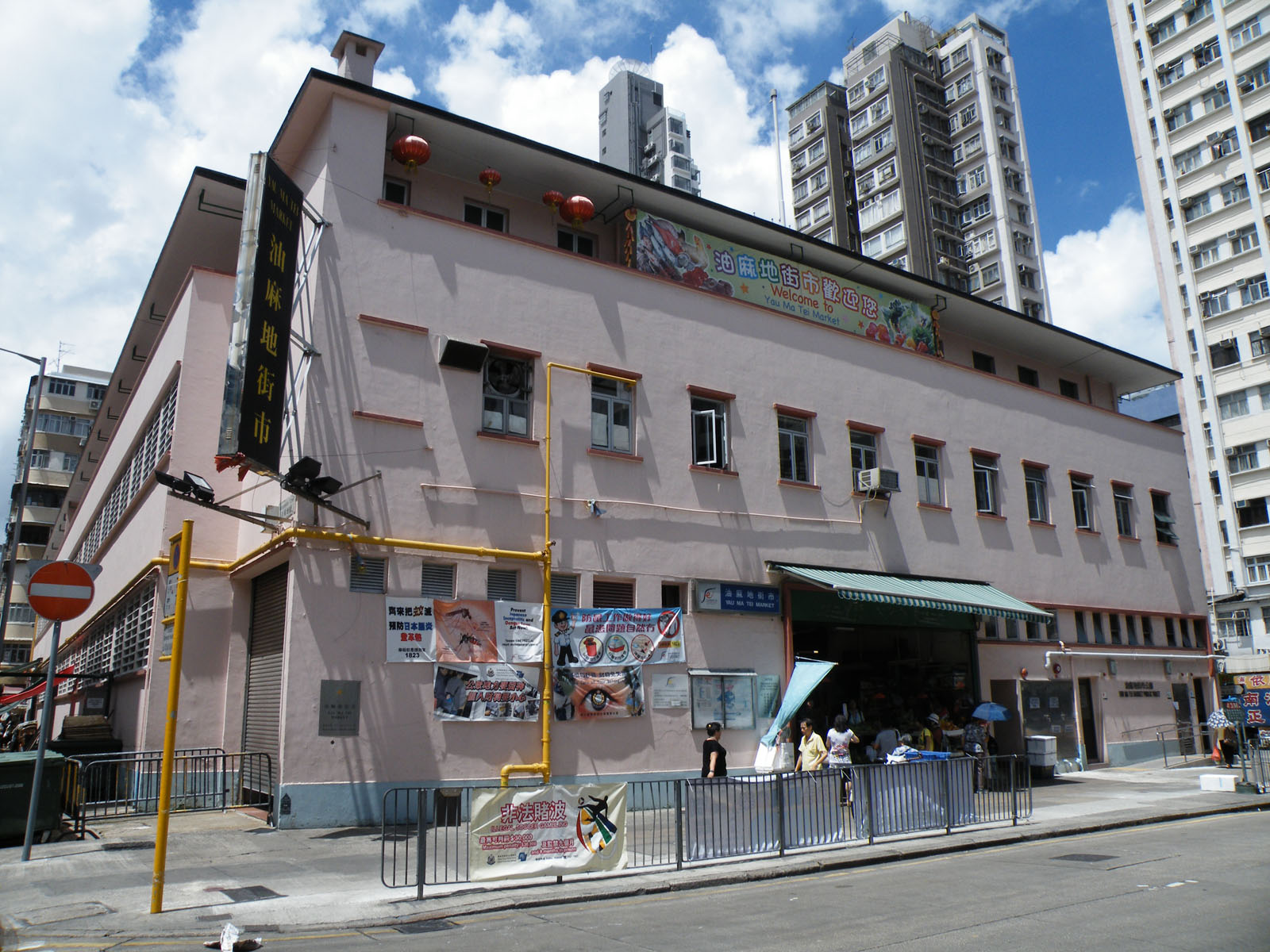 Yaumatei Market